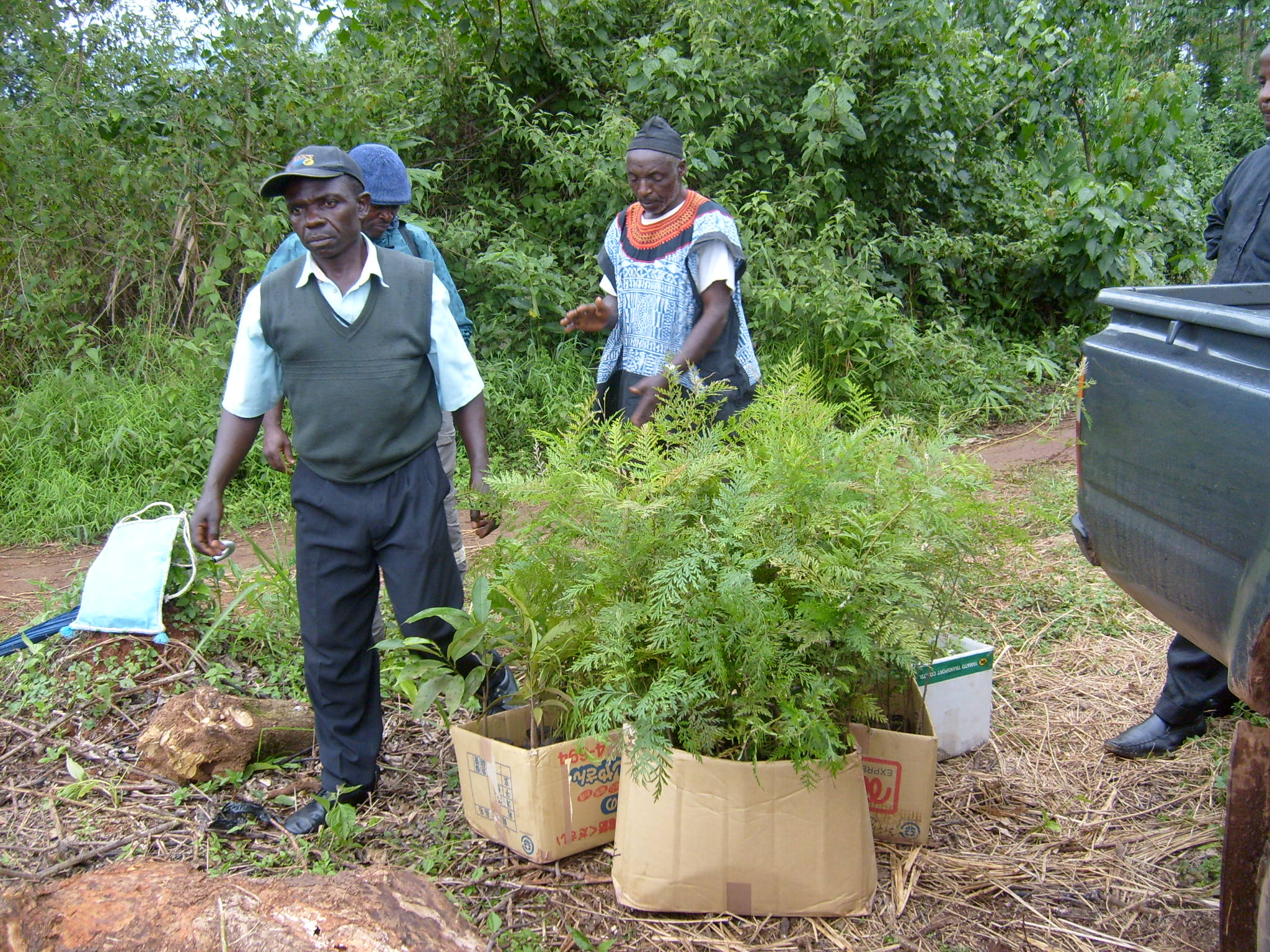 Baumschule in Kumba, Kamerun.